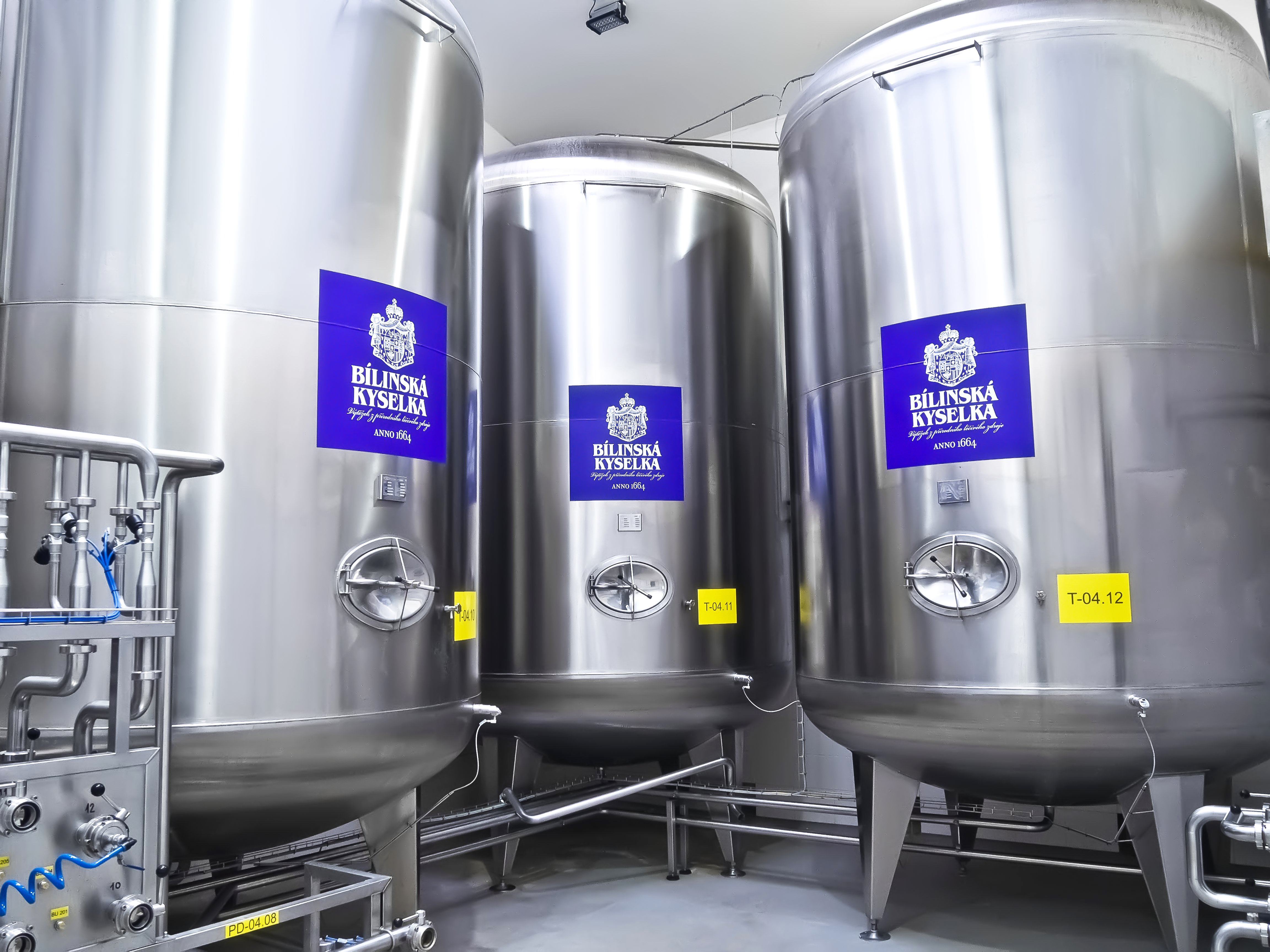 Přírodní léčivý zdroj Bílinská kyselka se stáčí do lahví bez dalších úprav. Kvůli výrobnímu postupu stáčení ve výrobních šaržích kontrolovaných zdravotním ústavem je od počátku 20. století využíván systém akumulace lázeňského pramene. Ten nahradil do té doby používaný systém kontinuálního plnění z pramene, který ovšem neumožnoval kontrolu zabaleného produktu.